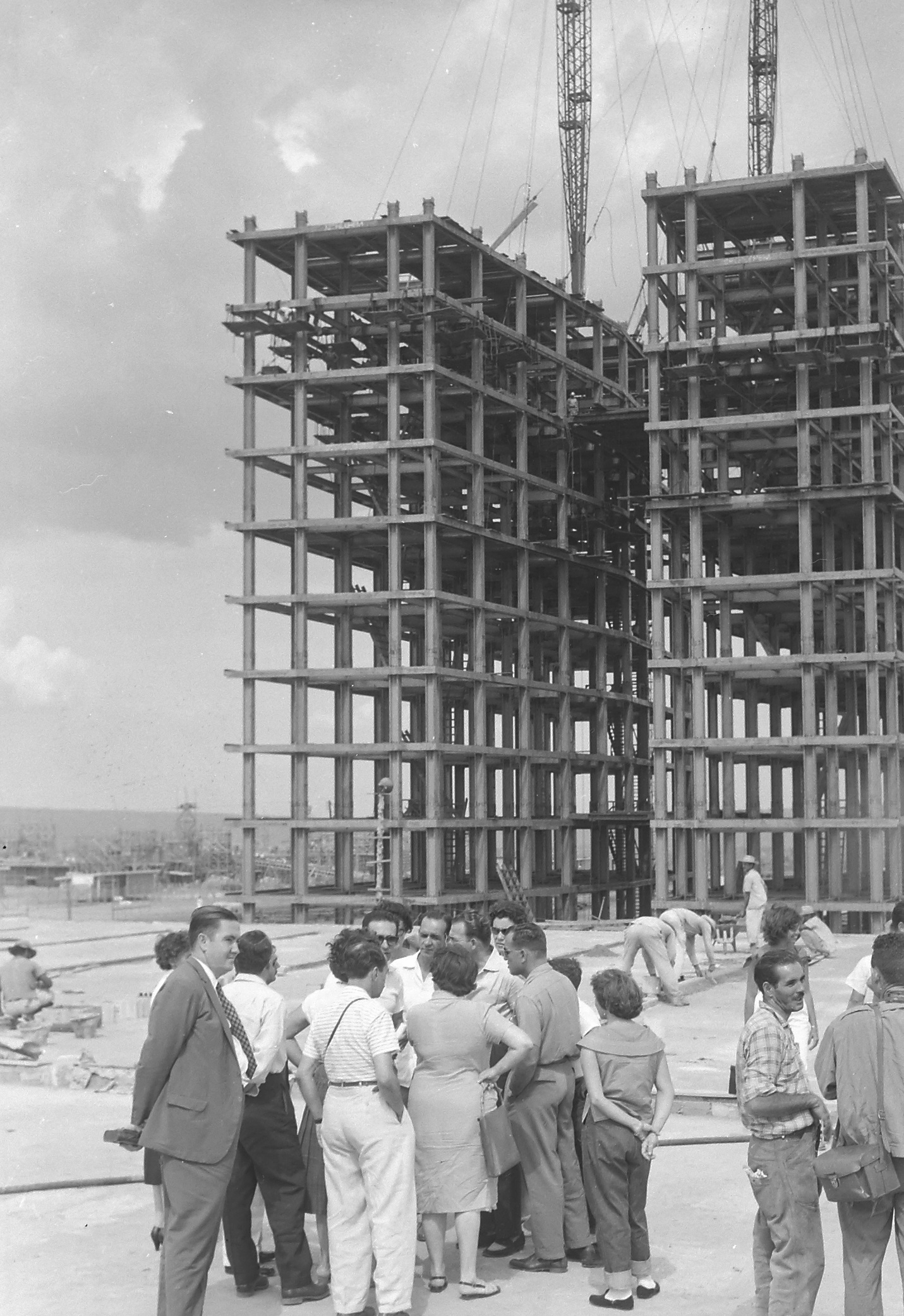 Visita de engenheiros a Brasília, obras no Congresso Nacional_1